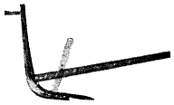 Hälsingeårder av ärjkrokstyp. En årder är ett plöjningsredskap som inte har någon vändskiva.